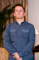 El parlamentario de Aralar, Daniel Maeztu, reunido con el Lehendakari, Patxi López, con motivo de la ronda de partidos para analizar la situación tras el último comunicado de ETA (26 de octubre de 2011).